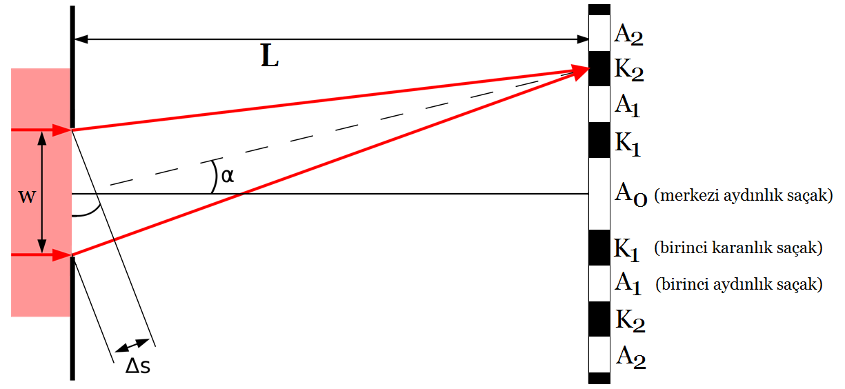 Tek yarıkta girişim deneyinde aydınlık ve karanlık saçaklar